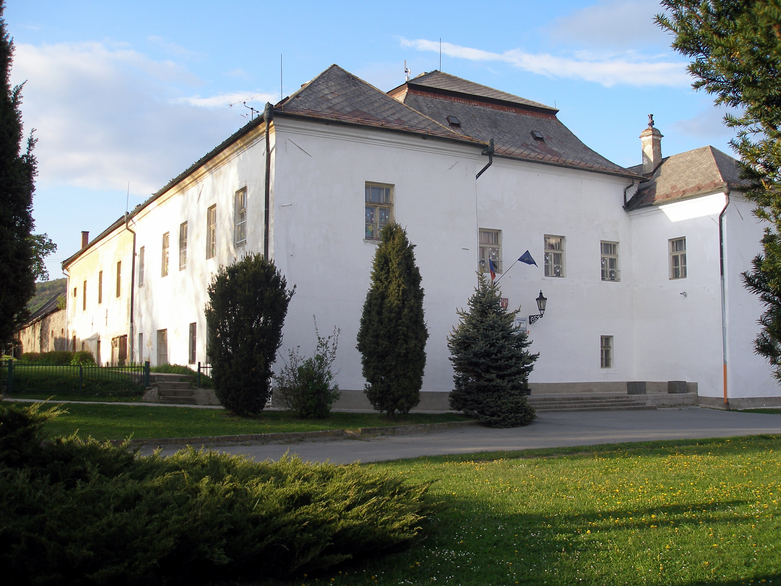 Obec Fintice okres Prešov región Šariš.Renesančný štvorkrídlový kaštieľ z prvej polovice 17.storočia v strede obce Fintice.